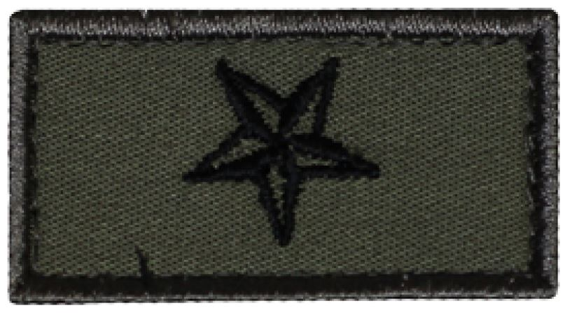 Chef Lage